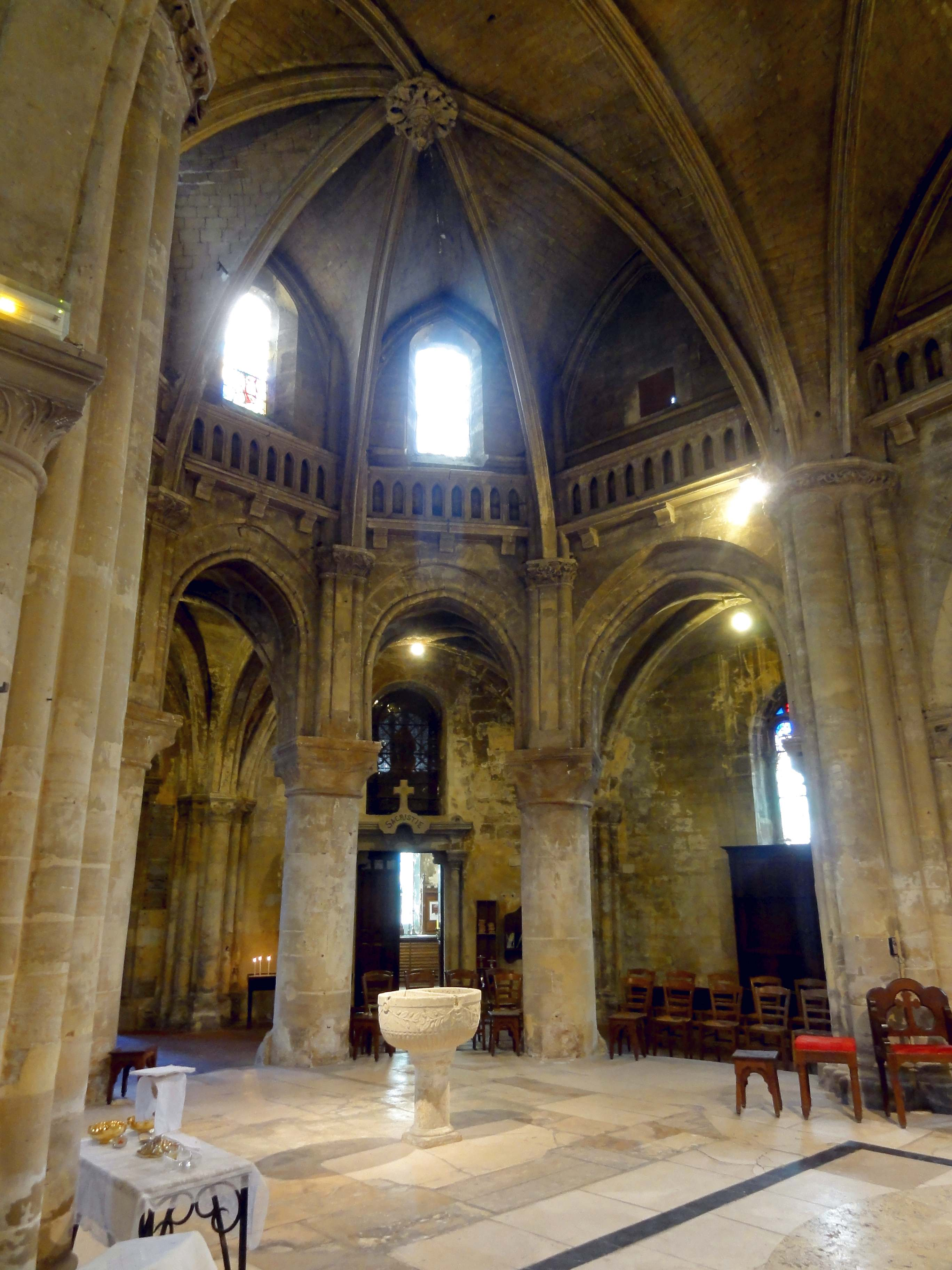 Intérieur de l'église - voir titre.